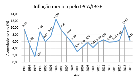 Inflação medida pelo IPCA/IBGE